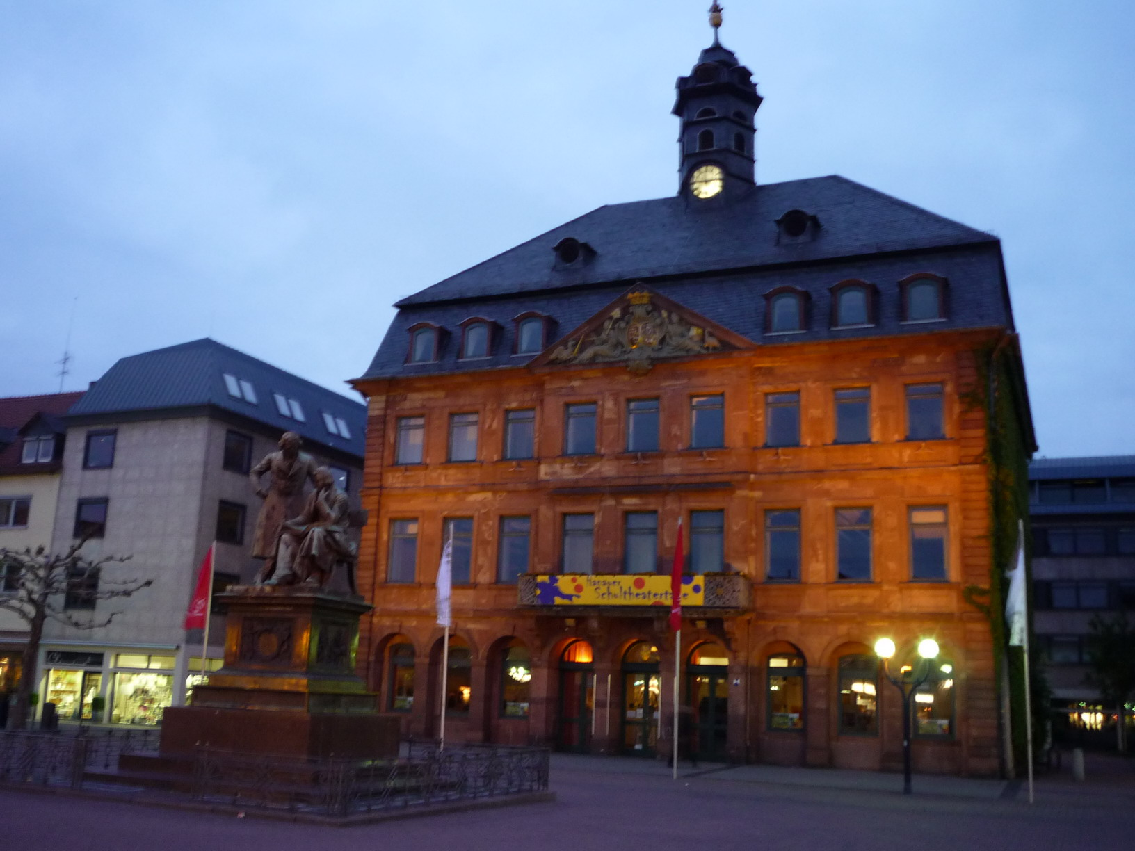 Neustädter Rathaus in Hanau.